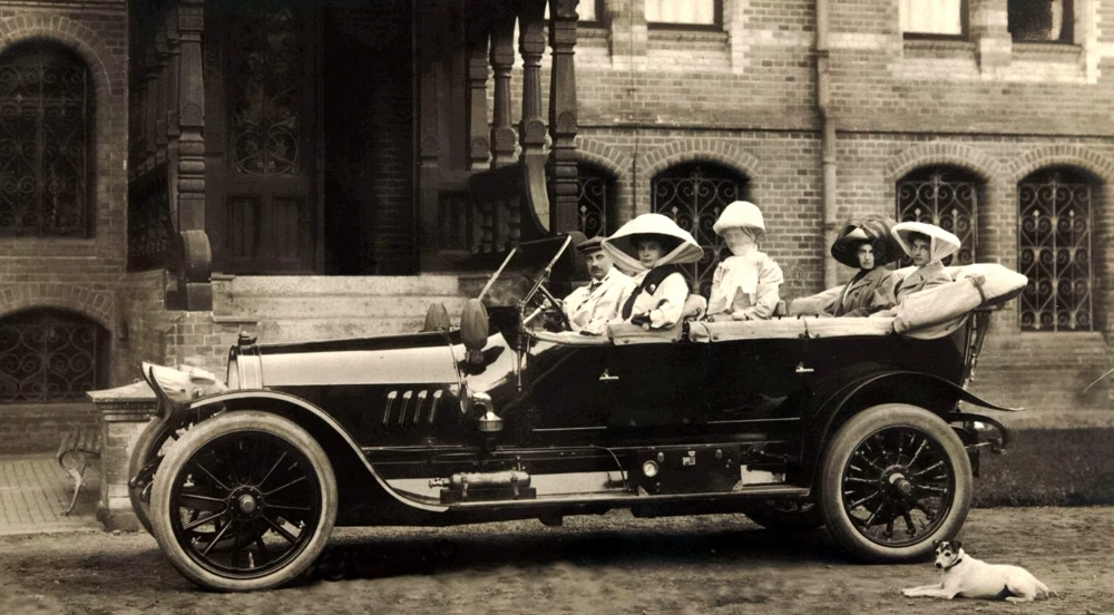 Kronprinzessin Cecilie, Großherzog Friedrich Franz IV. nebst Gemahlin und Kronprinzessin von Dänemark Alexandrine im Automobil vor den Eingang zum Jagdhaus Gelbensande